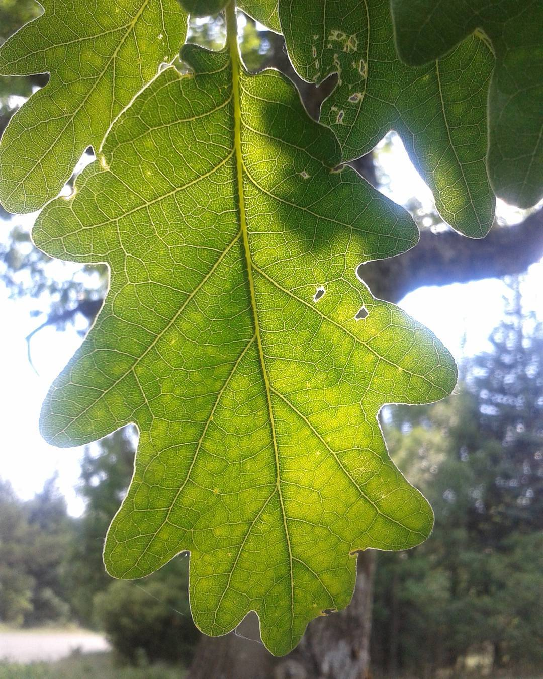 Feuille d'un chêne à la montagne de Lure